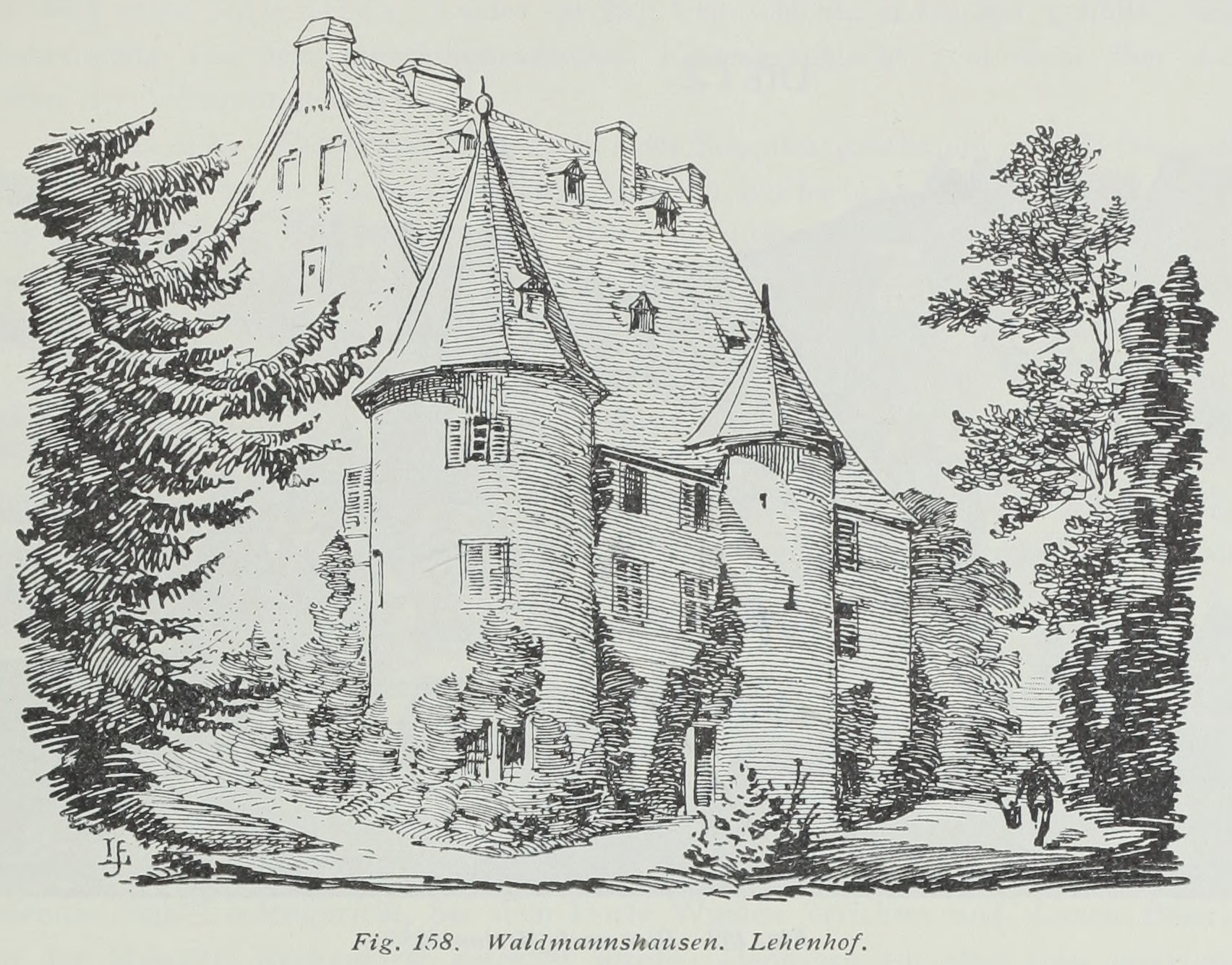 Waldmannshausen Lehenshof